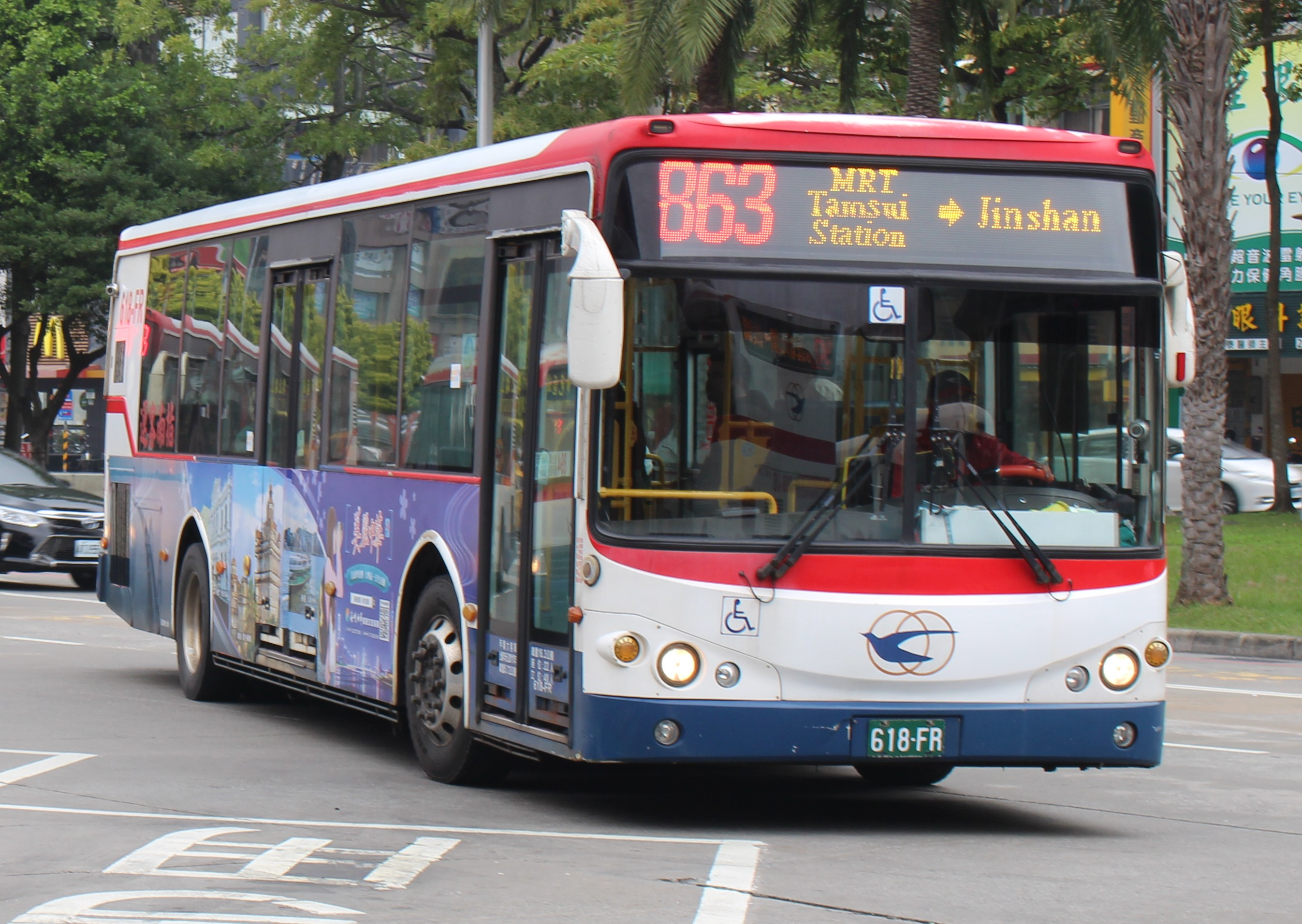 指南客運 2011 KINGLONG KL6112U1 618-FR 863